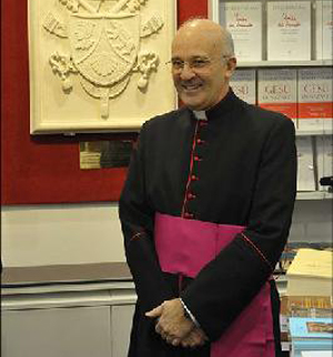 Alfred Xuereb en el Vaticano